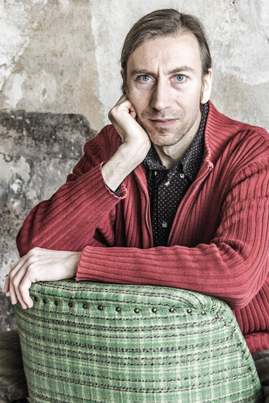 Lyriker Rainer Stolz. Foto: Thomas Klingberg